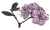 Рододендрон остроконечный (Rhododendron Mucronulatum Turcz). Официальный рисунок природного символа города Владивостока, цветка рододендрона остроконечного. Постановление № 256 «О природной символике г. Владивостока» от 28 февраля 1994 г.